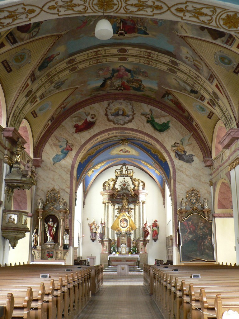 Interiér kostela Nanebevzetí Panny Marie ve Zlatých Horách.